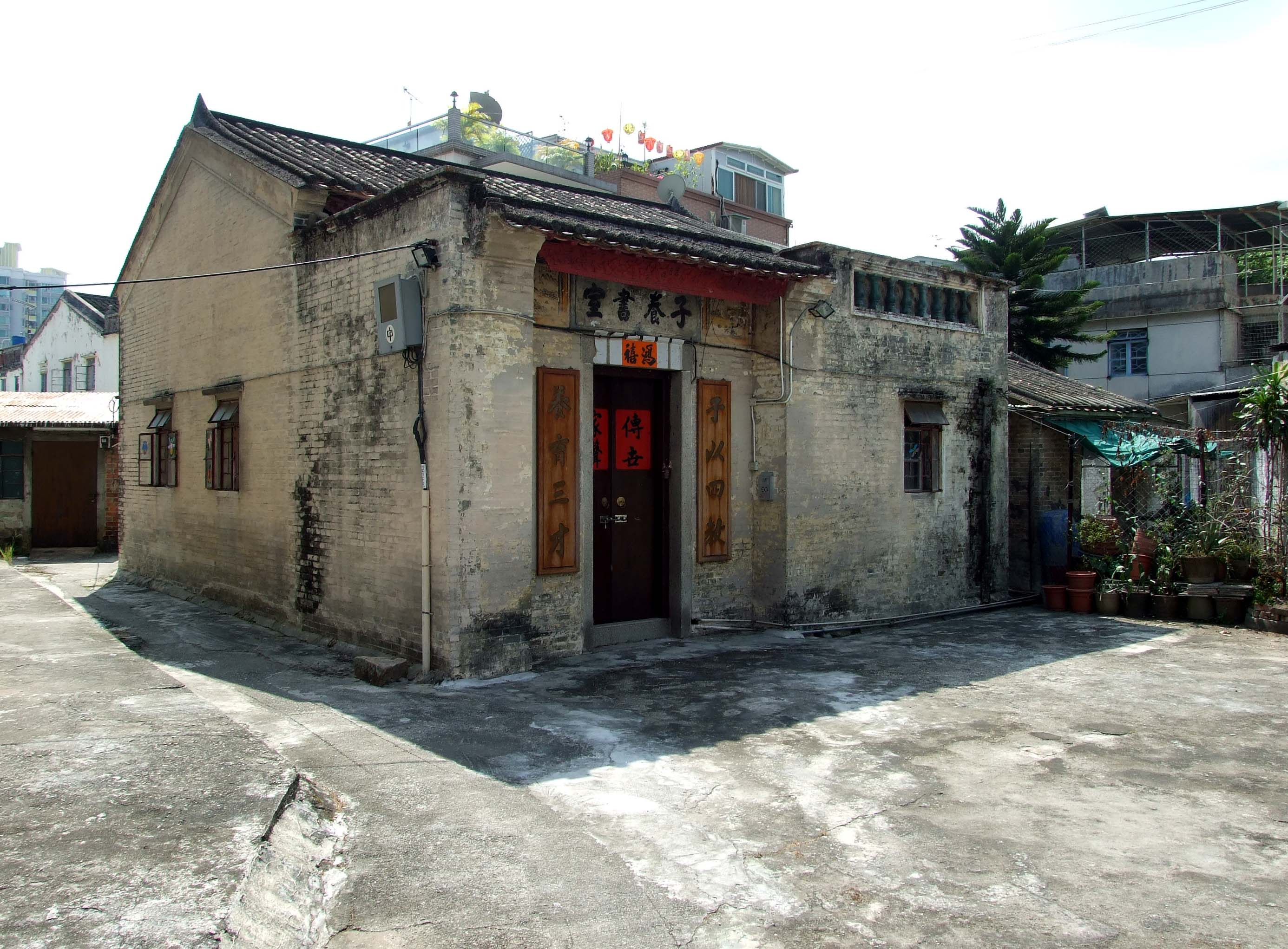 中文（香港）: 十八鄉大旗嶺村子養書室